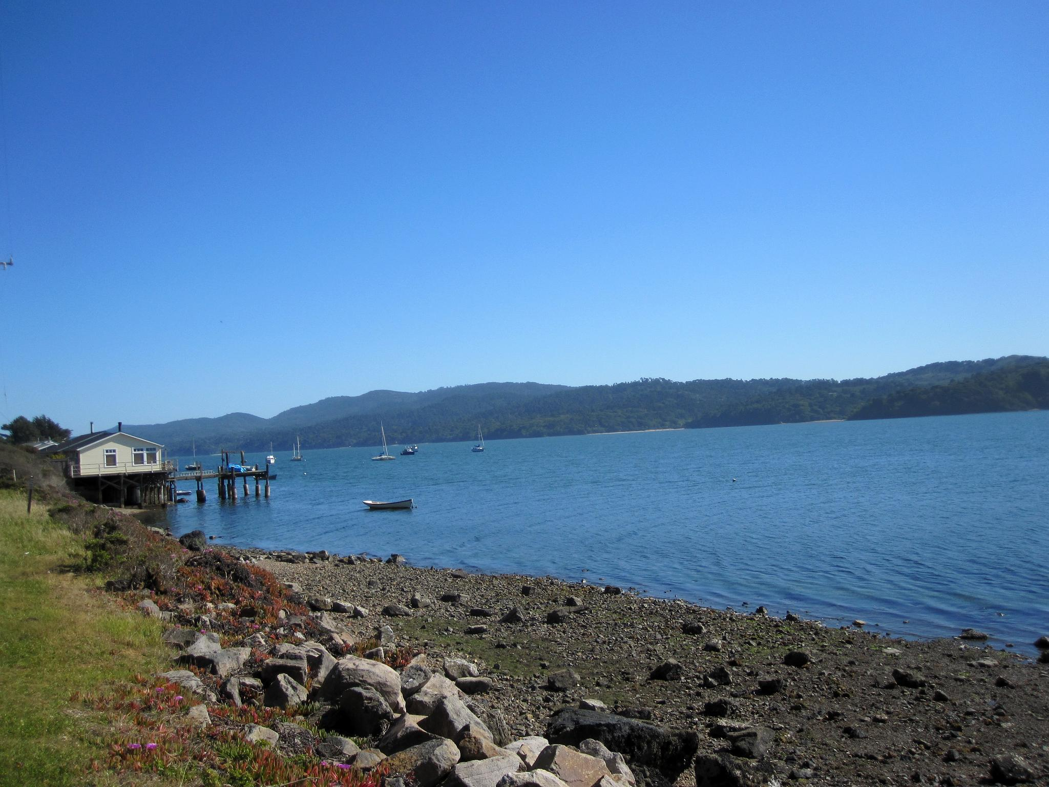 Tomales Bay